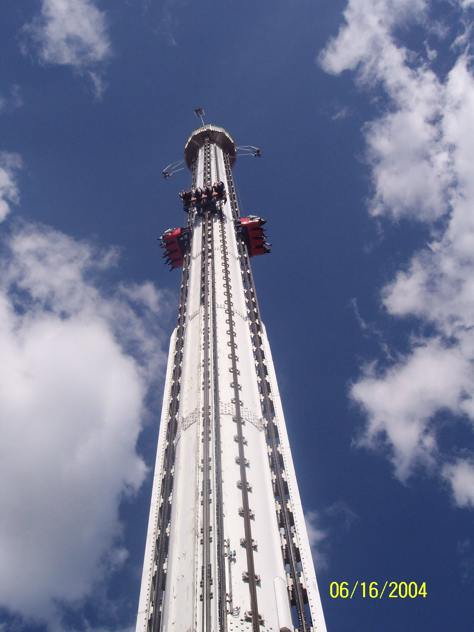 Attraksjonen Fritt Fall i Gröna Lund i Sverige. Bilde tatt av Bruker:ThorRune på skoletur 2004